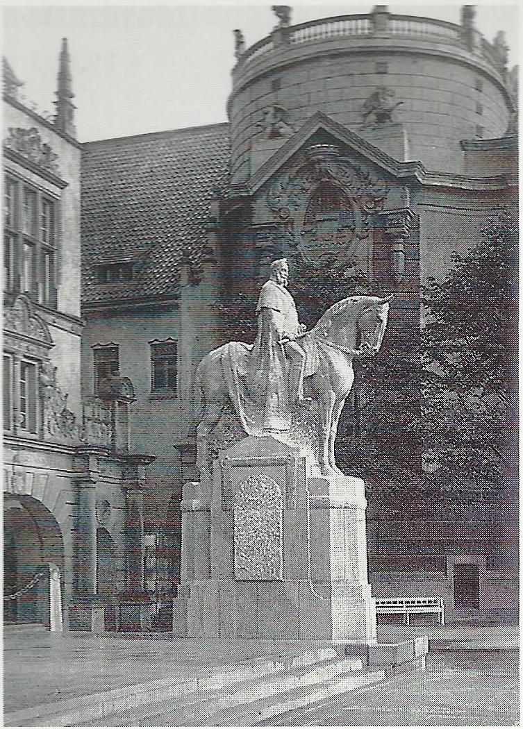 Kaiser-Wilhelm-Denkmal, Bielefeld